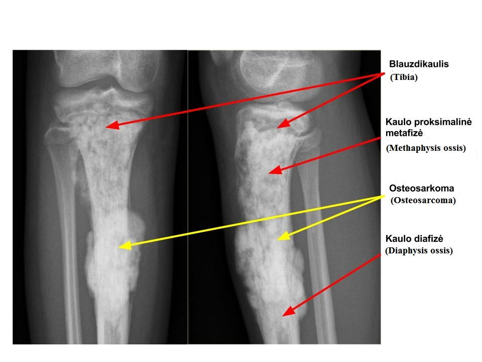 Osteosarkomos, esančios paciento blauzdikaulyje, vaizdas (iš skirtingų šonų).